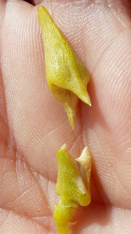 Cakile maritima (Oruga de mar) : Fruto con sus artejos separados - Dique de la Rambla de Cañarete, Águilas (Murcia, España).